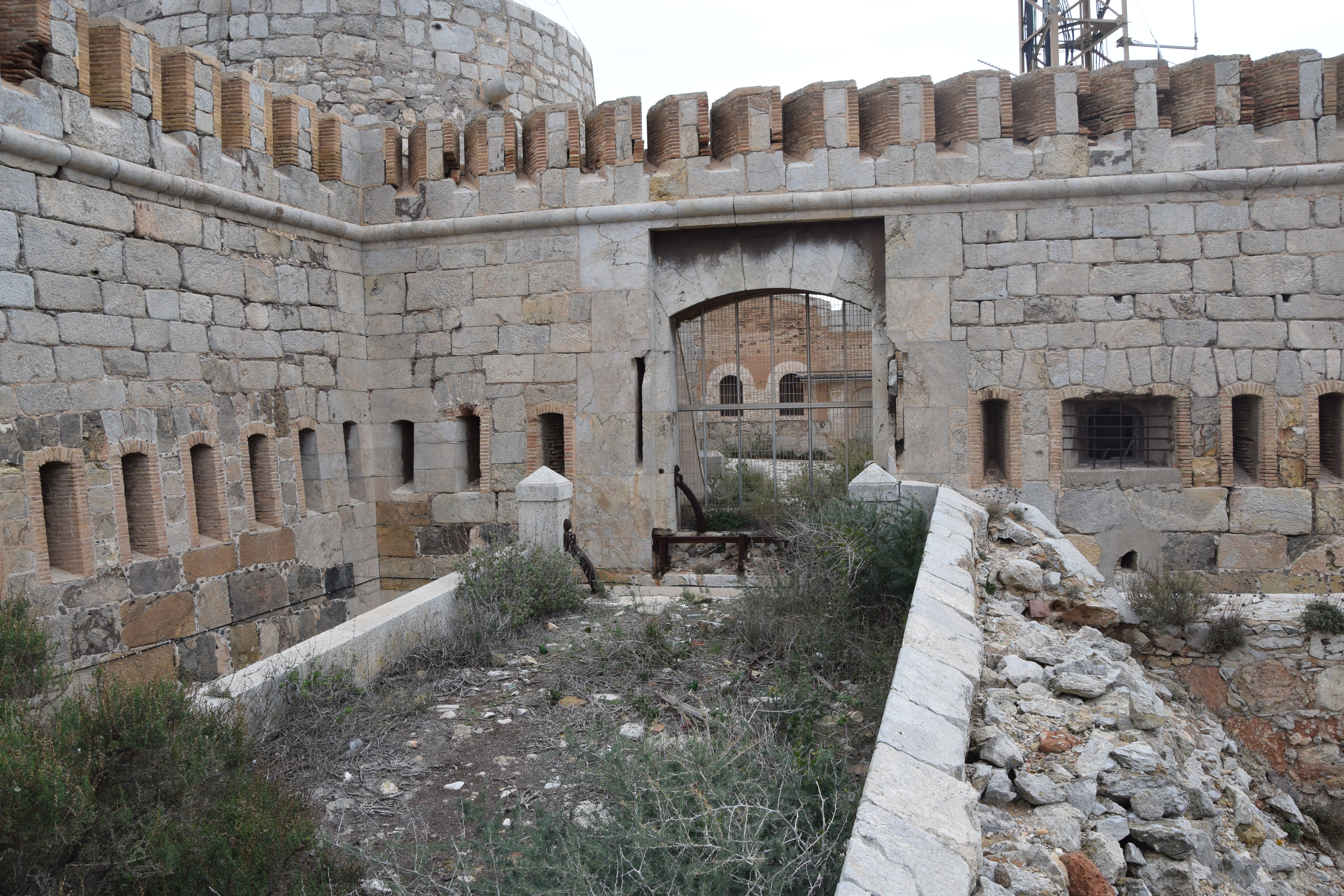 Castillo de San JuliánLa construccion del castillo se finalizo en el año 1888, y como los otros dos de la ciudad de Cartagena tuvo como finalidad principal la defensa de la ciudad y su base naval posee cinco frentes defensivos tres de los cuales son de tipo abaluartado en los restantes uno es de tipo poligonal con su corespondiente caponera y el ultimo que defiende la puerta de acceso es del tipo atenazado.